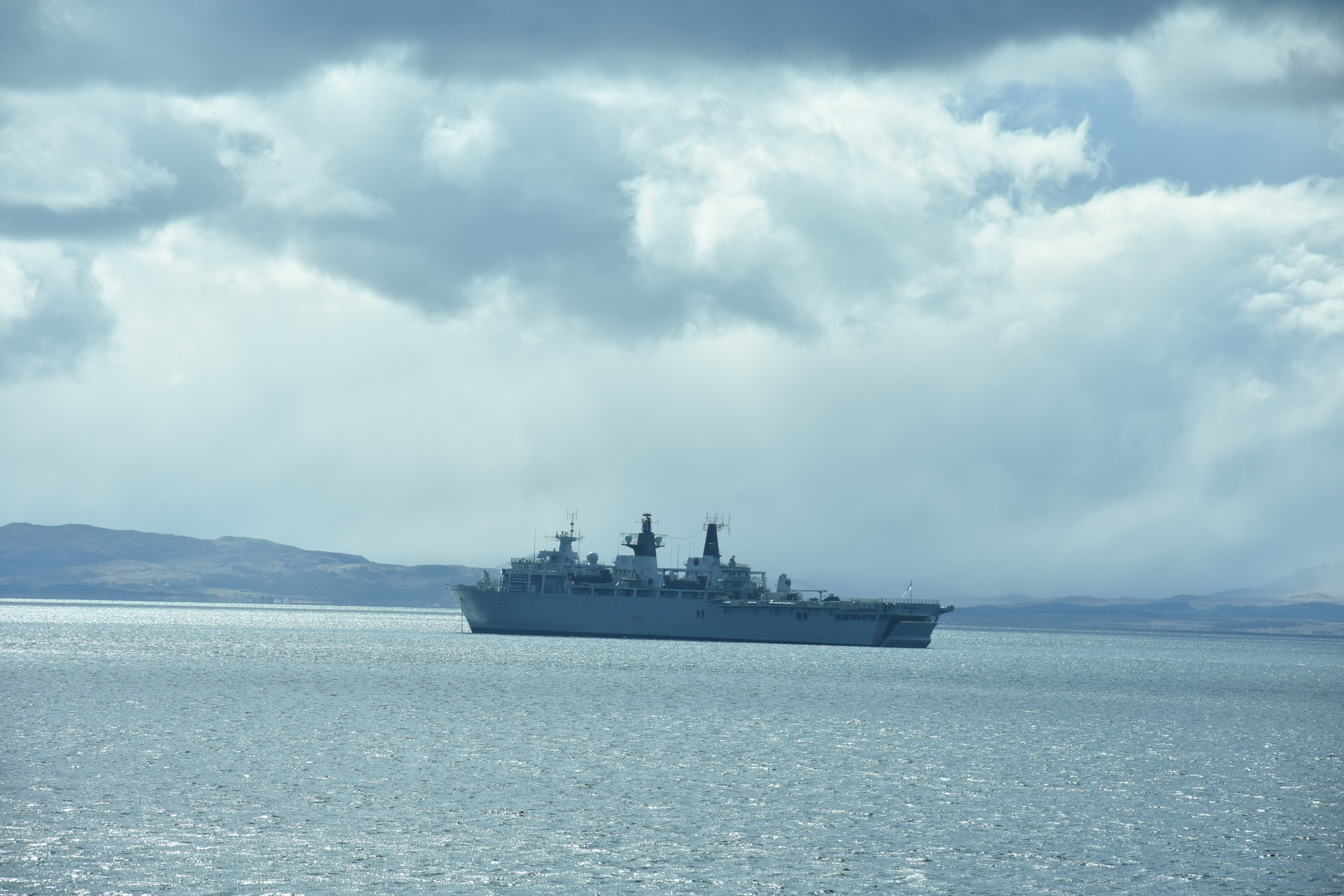 HMS Bulwark in der nähe von Frot William(Schottland)